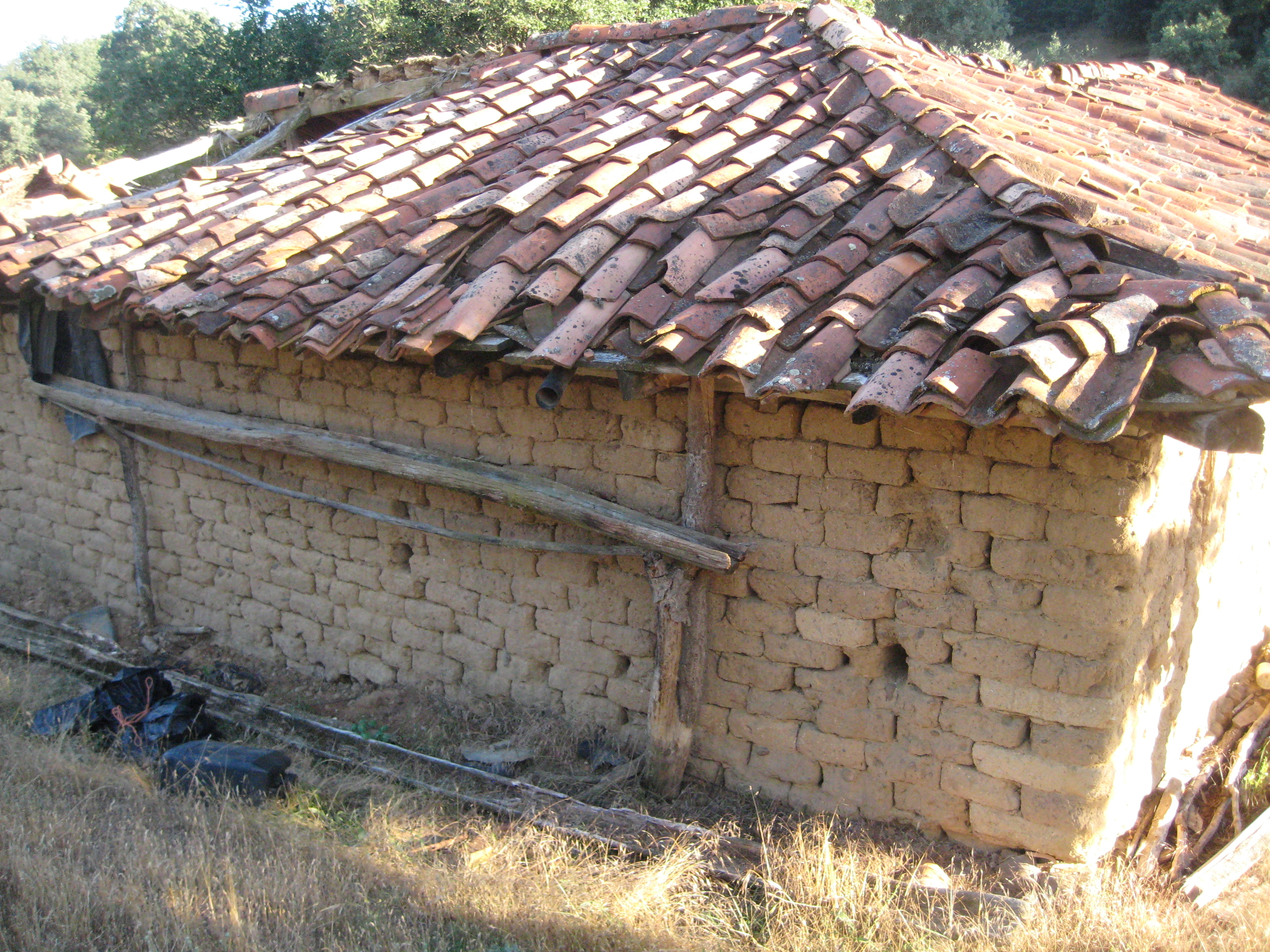 CorralValmoro Julio 2013